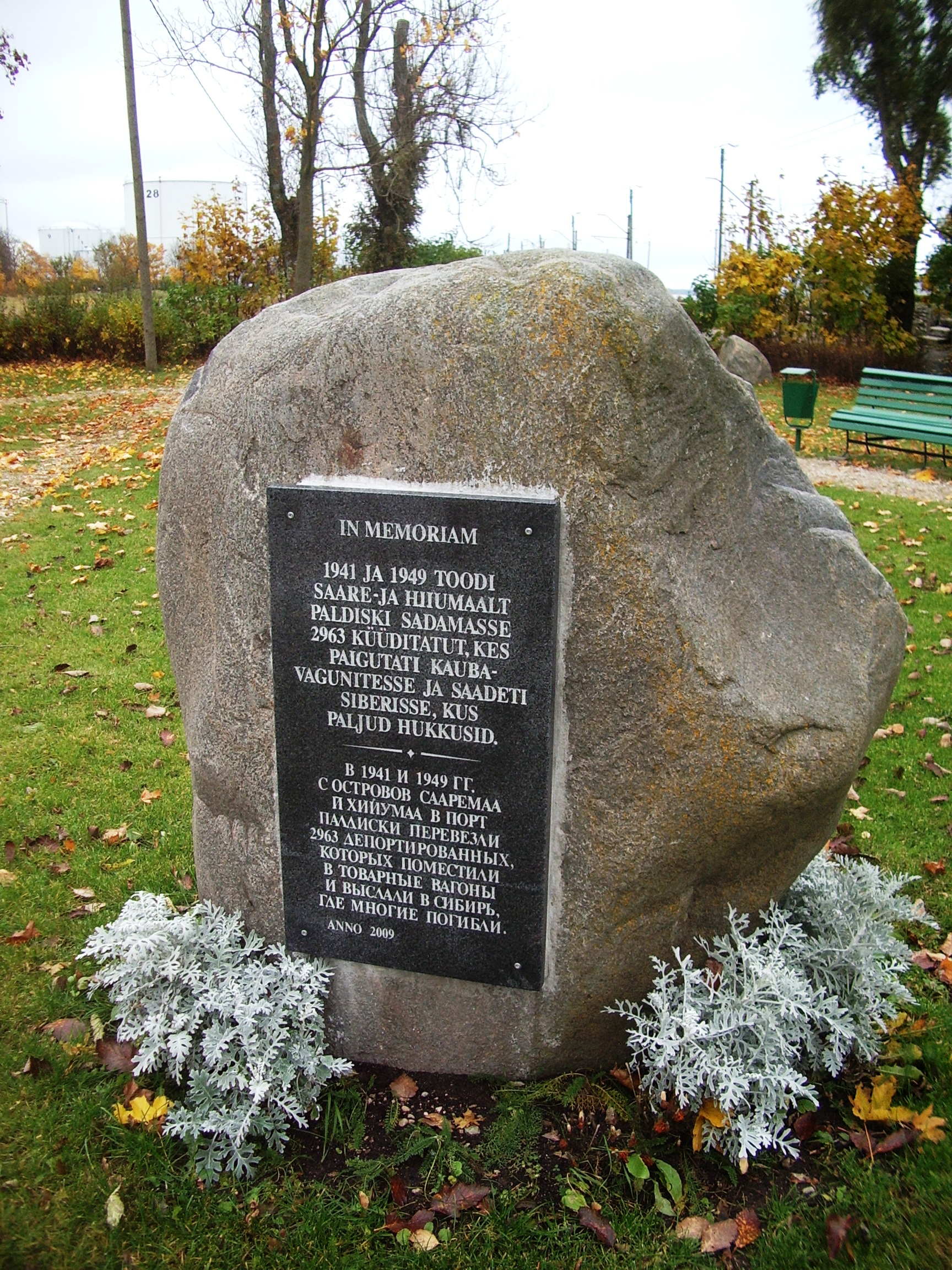 Küüditatute mälestusmärk Paldiskis